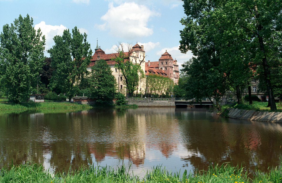 Niemodlin